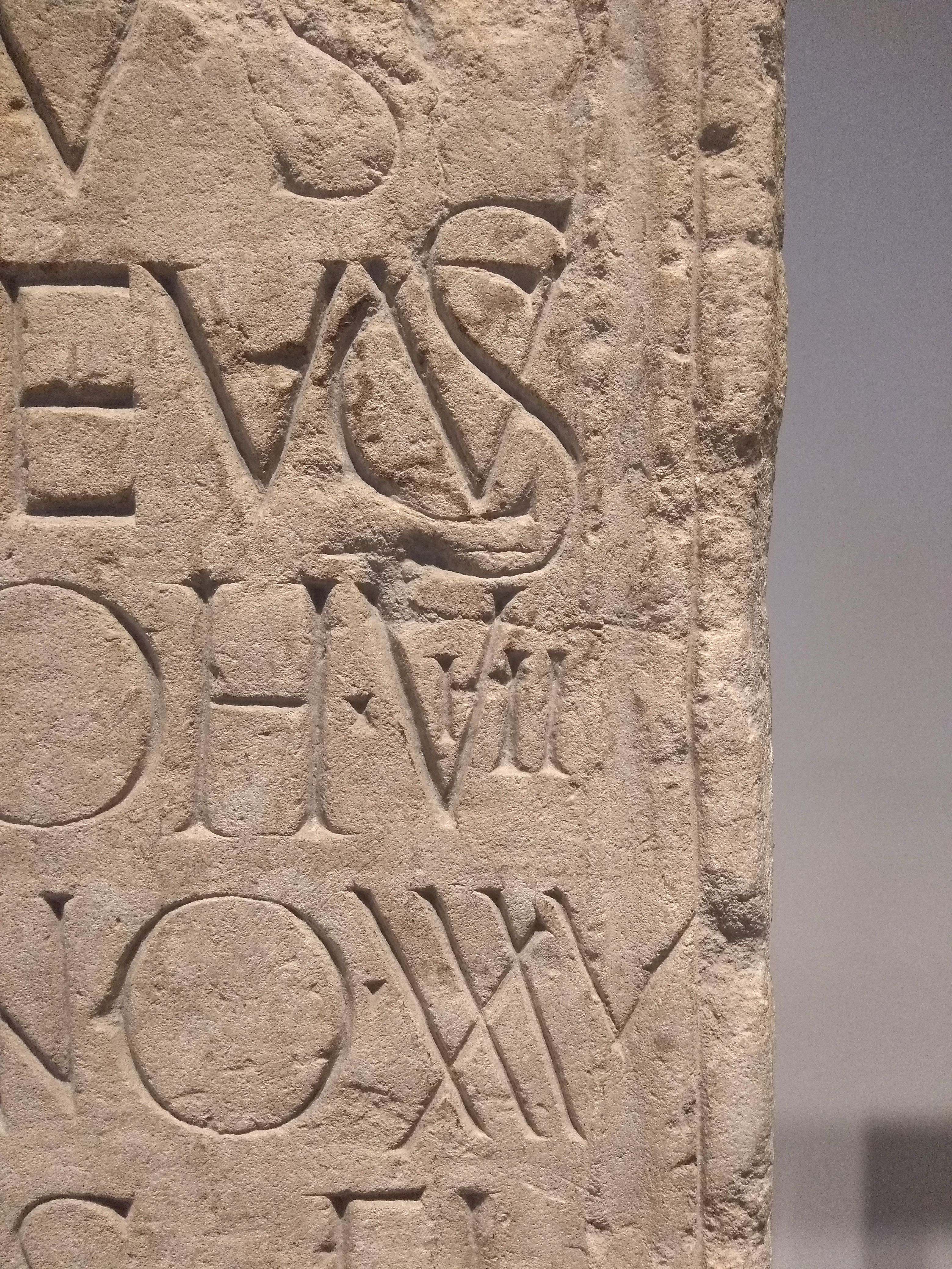 Grabstein des römischen Hilfstruppensoldaten Dasmenus vom illyrischen Stamm der Breuker, 40/50 n. Chr. (CIL XIII,7801), Detailansicht einer Stelle mit diversen Ligaturen